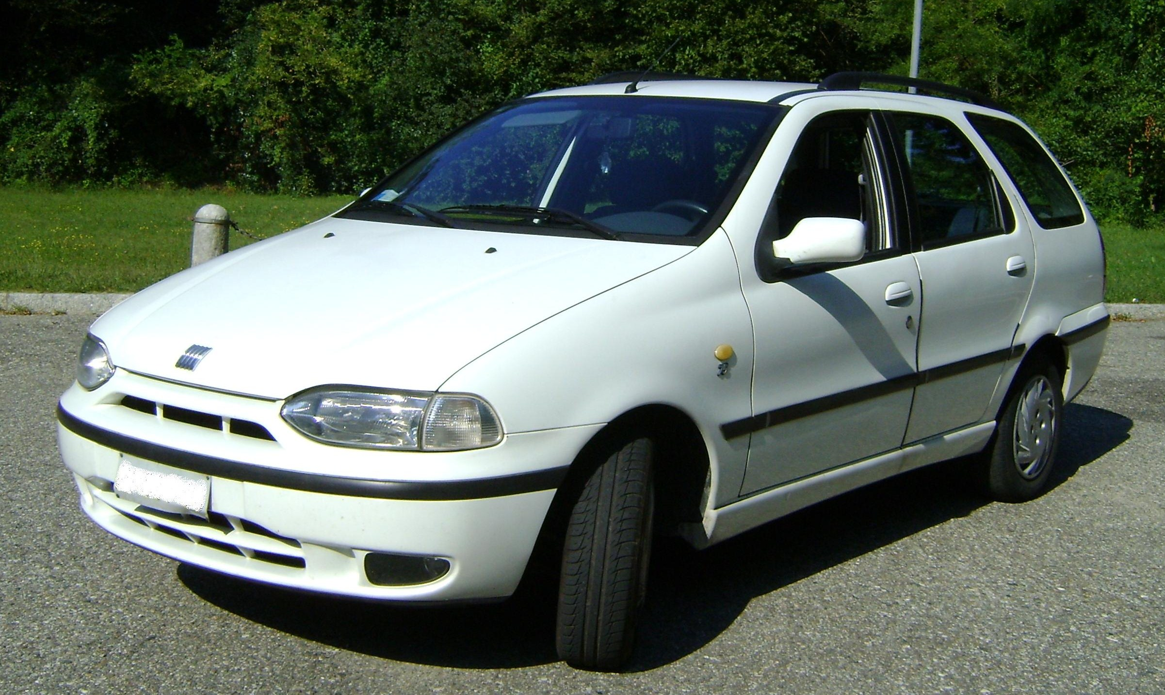 Fiat Palio Weekend 1242 cc 75 cv del '97.